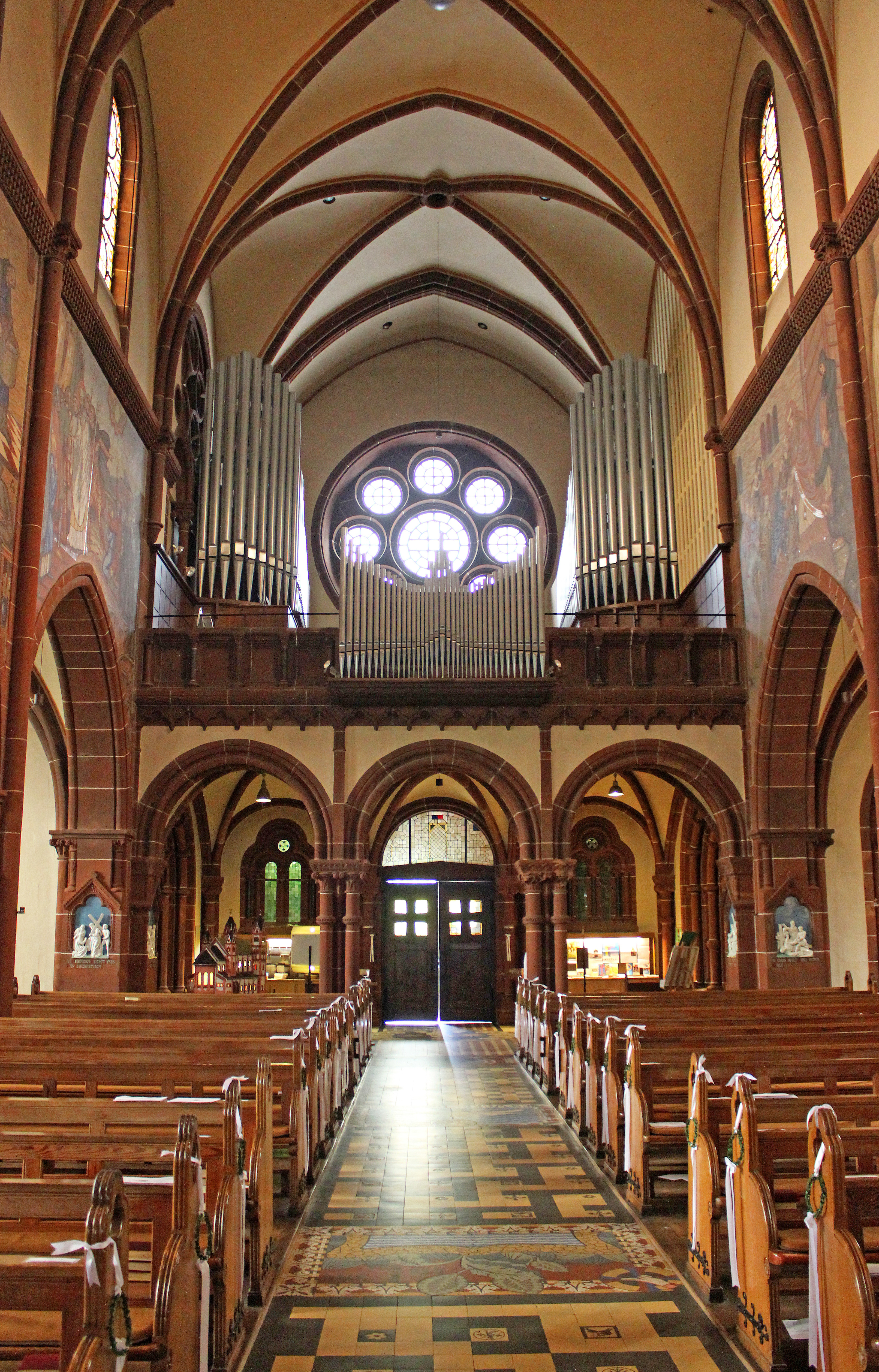 Blick ins Innere der katholischen Pfarr- und Wallfahrtskirche St. Lutwinus in Mettlach, Landkreis Merzig-Wadern, Saarland